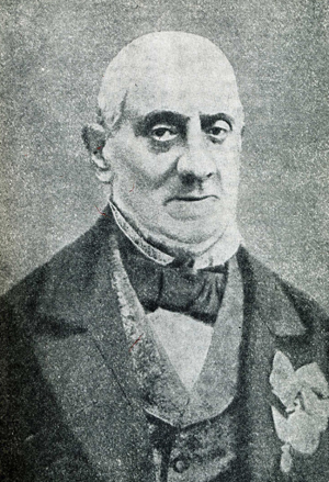 Giovan Battista Mazzoni, industiale italiano (1789-1867)